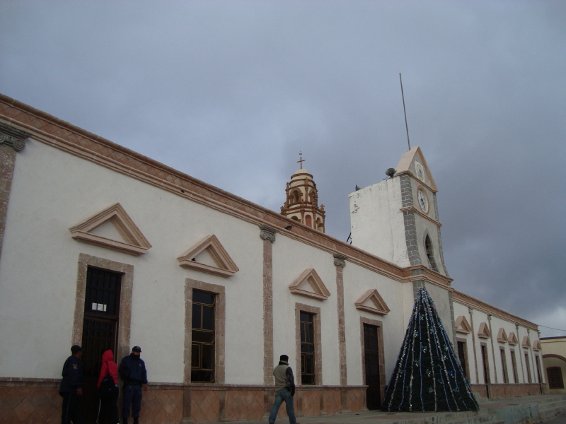 Casa de la Comunidad (administración) de Cardonal)